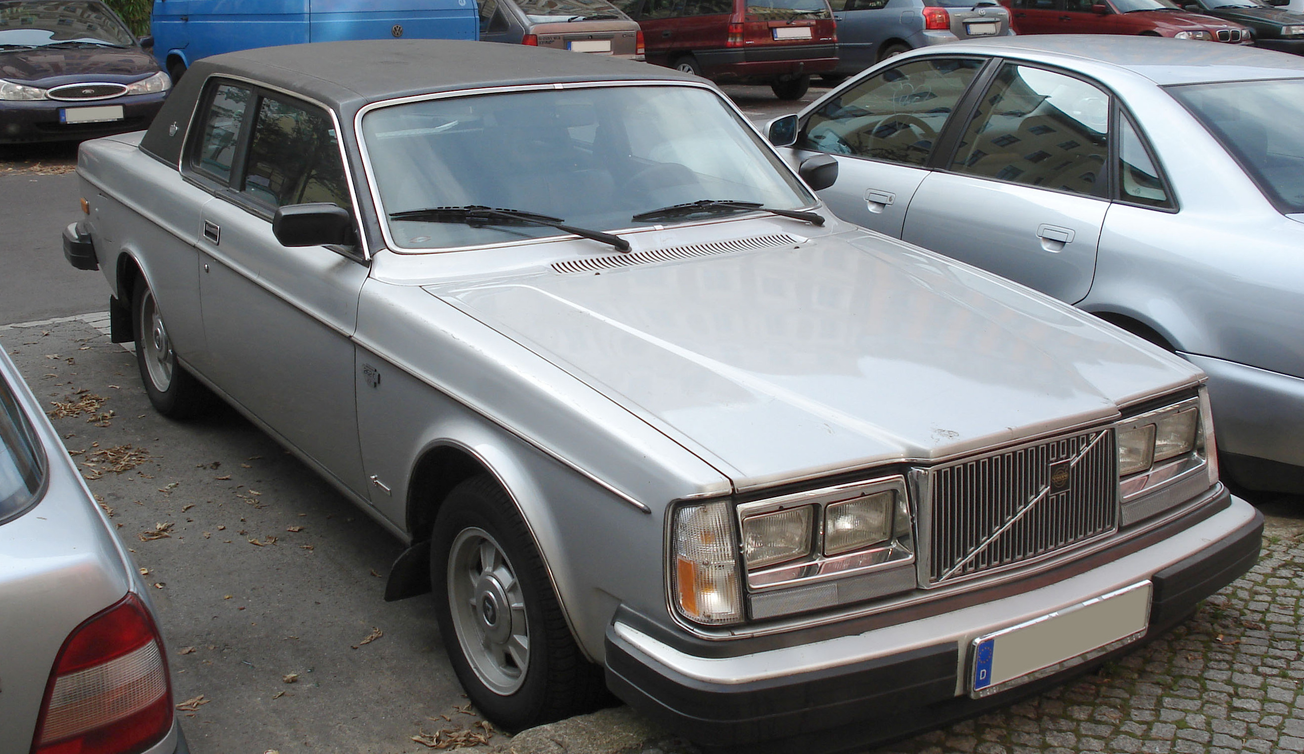 Volvo 262 C Bertone Coupé